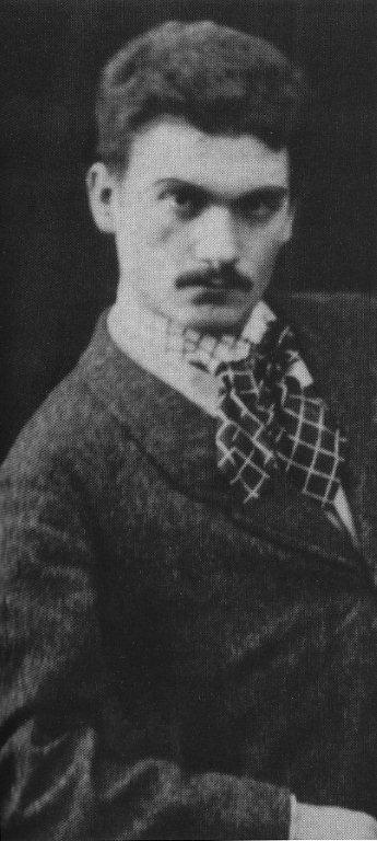 Alberto Riva